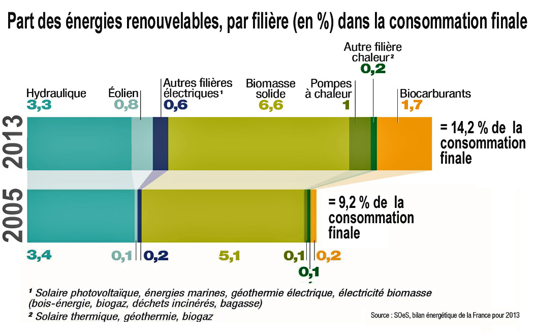 Évolution de la part des énergies renouvelables dans la consommation finale énergétique entre 2005 et 2013 ; d'après le SOeS cité par la Stratégie nationale de transition écologique vers un développement durable. Ce graphique montre l'importance encore grandissante de la biomasse énergie, notamment en France encouragée par la PPE et par un projet de stratégie nationale biomasse.